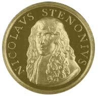 Et billede af forsiden af stenomedaljen